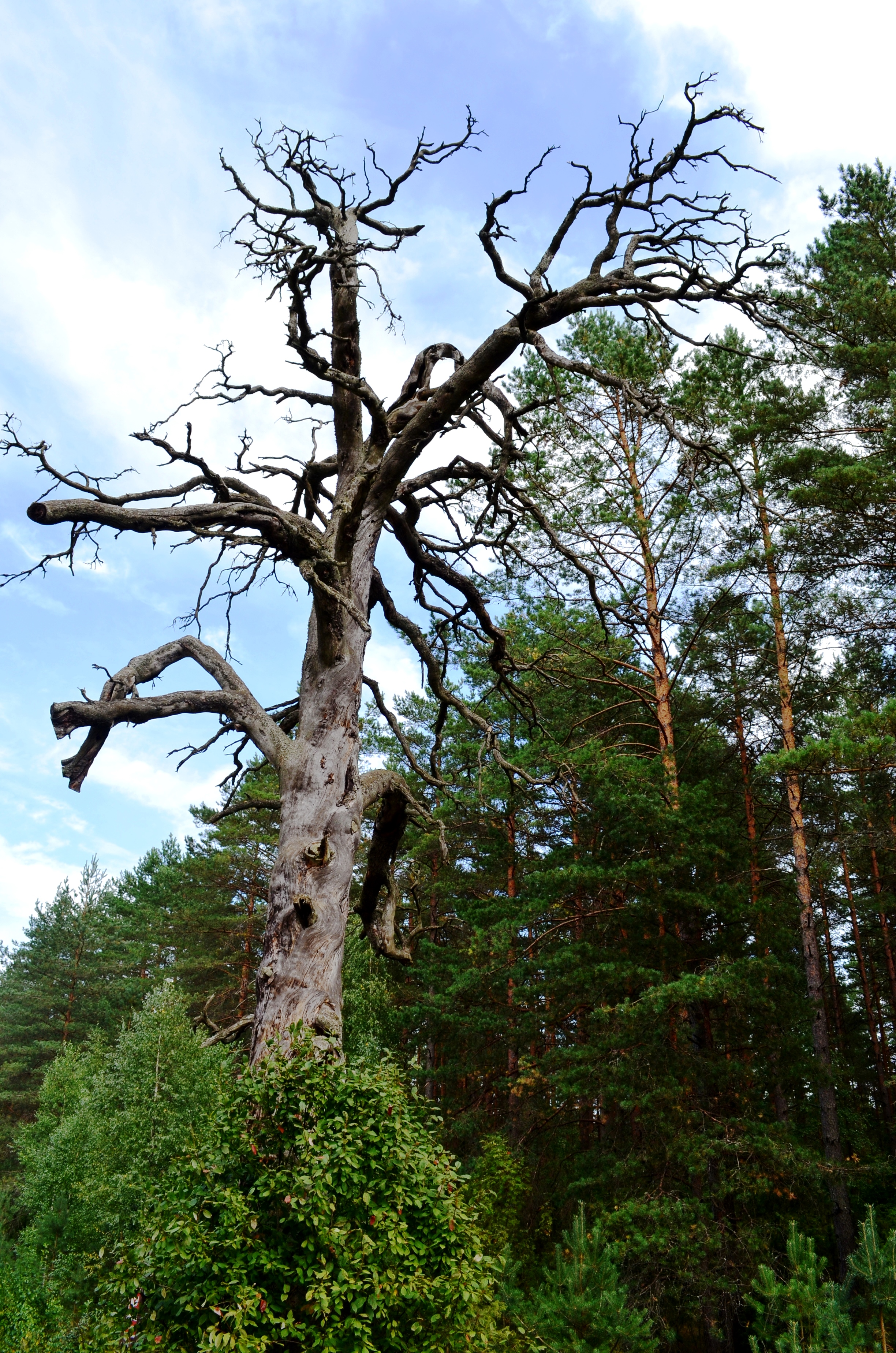 Drevėta pušis netoli Marcinkonių, prie RK5003 ir RK5011 kryžkelės, Varėnos r.